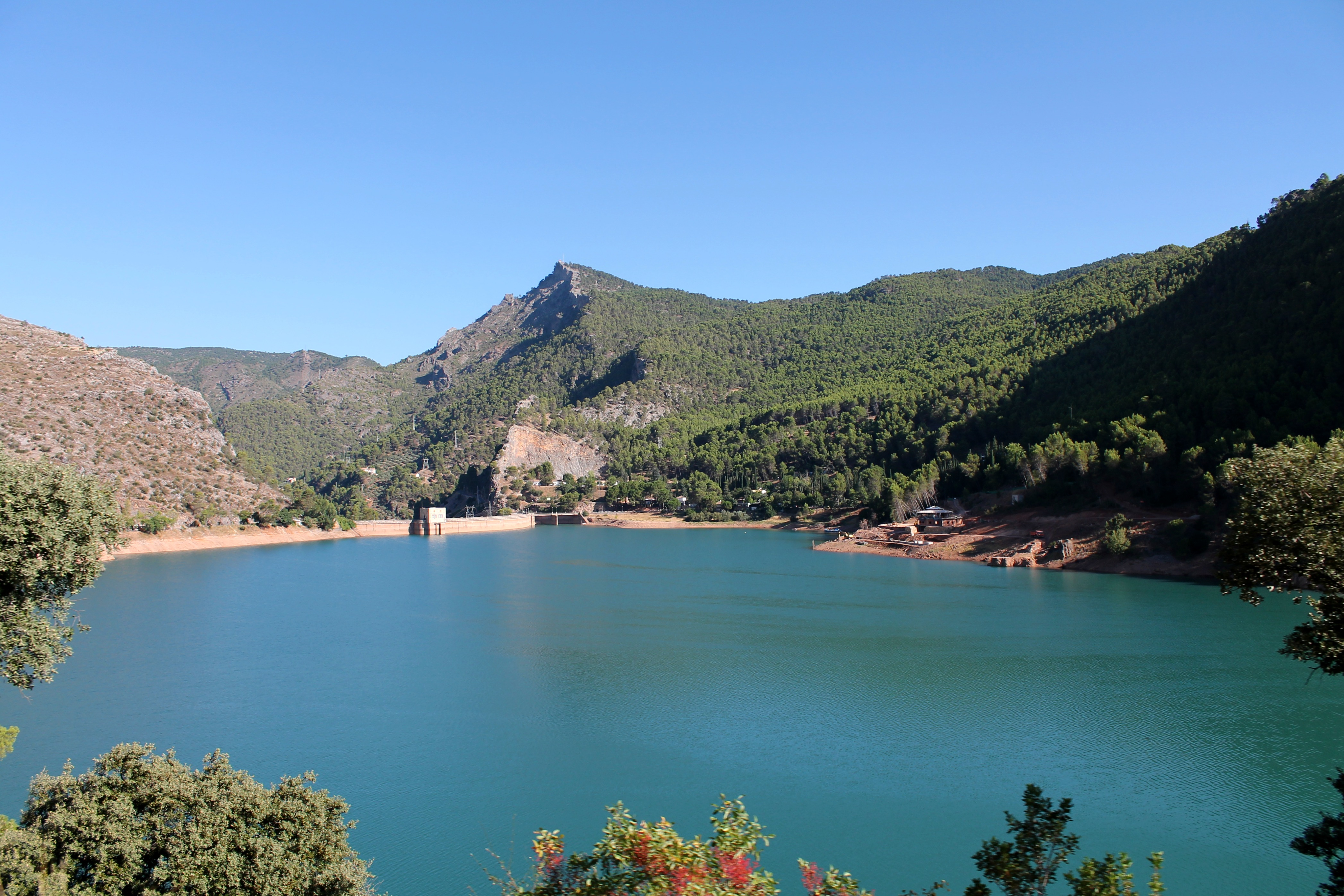 Pantano del Tranco.